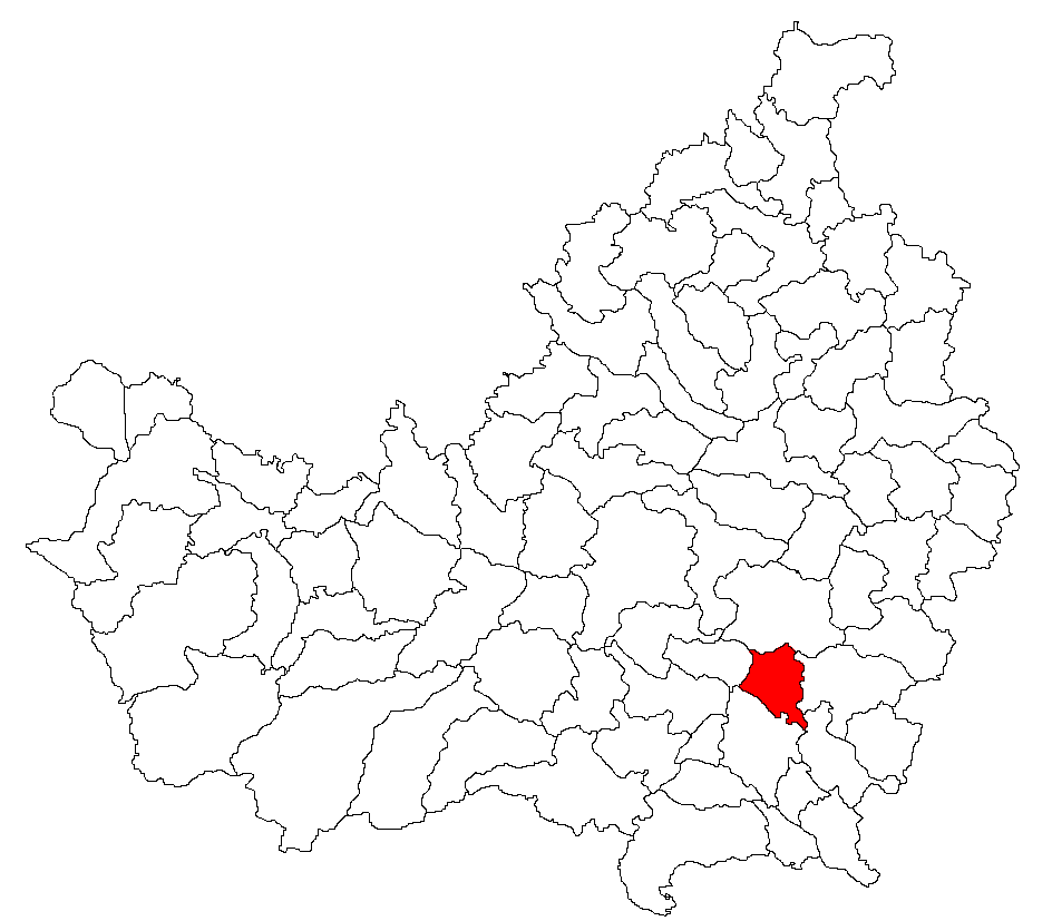 Comuna Ploscos, judeţul Cluj